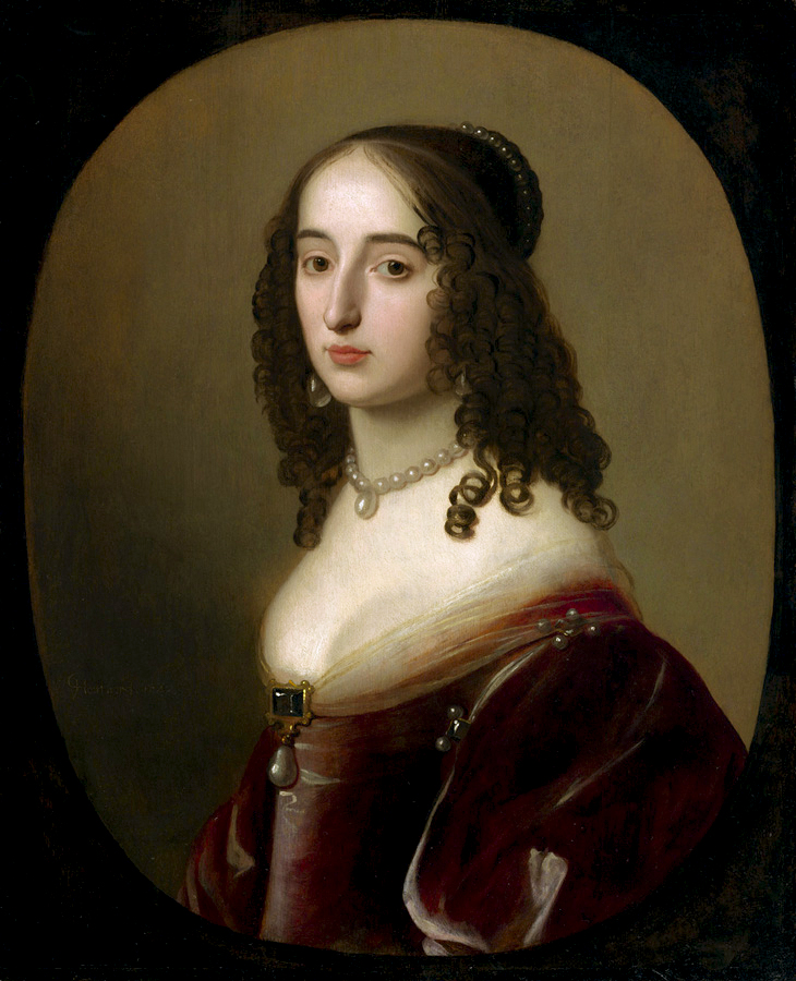 Oil on Panel. 73.5 x 58.4cm.